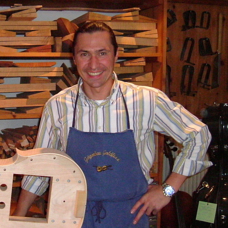 Geigenbaumeister in Regensburg